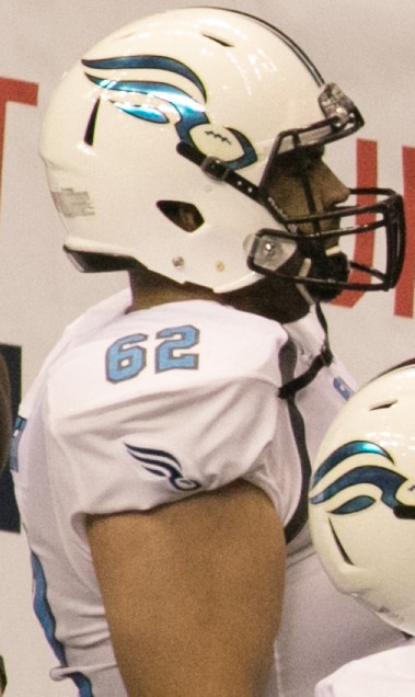 Valor 47 / Philadelphia Soul 48